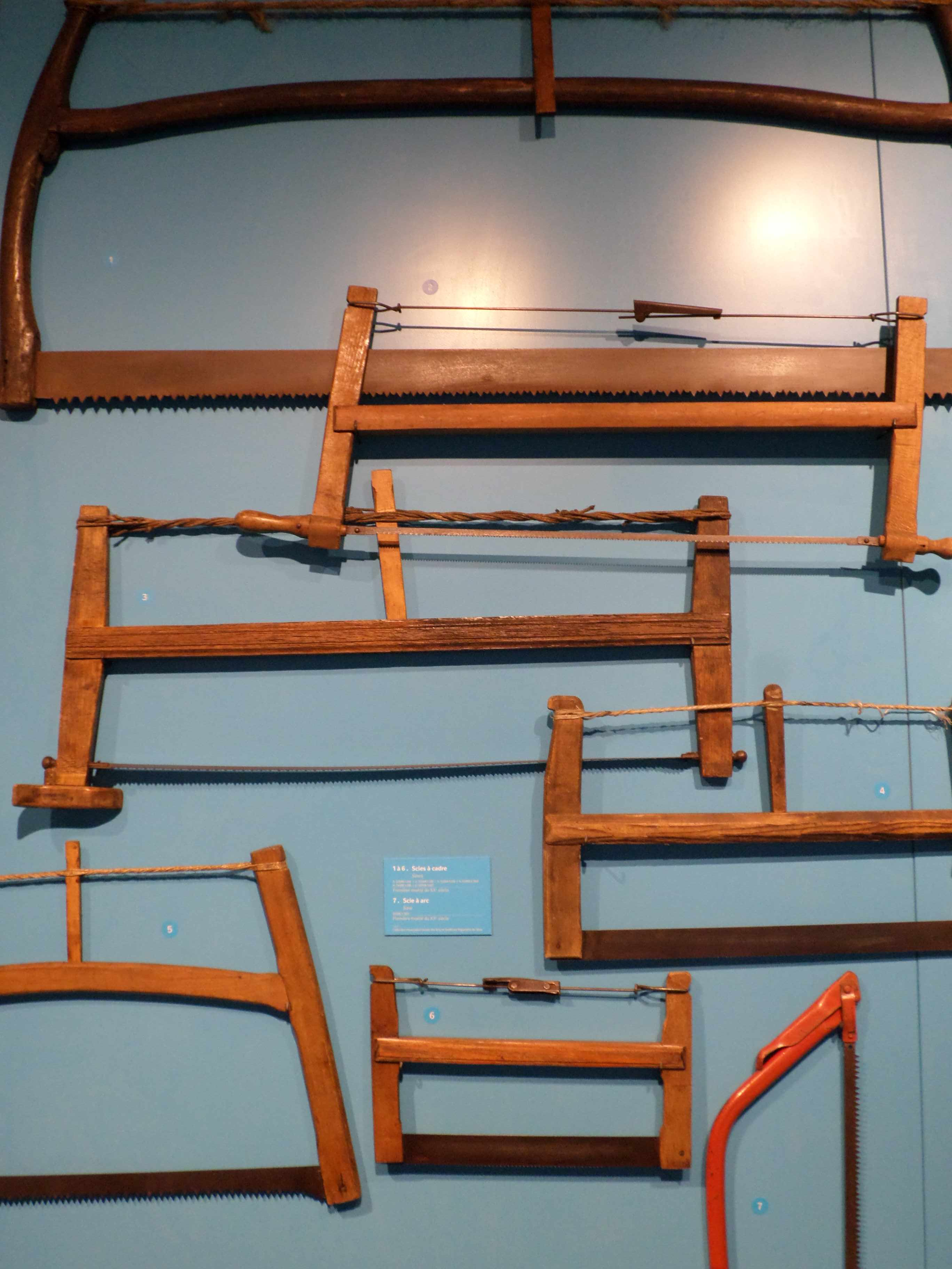 scie